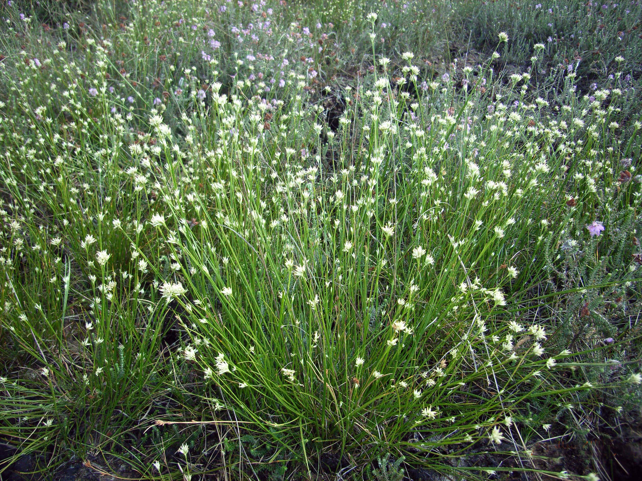 Weißes Schnabelried (Rhynchospora alba) in Nordwestdeutschland (Niedersachsen)